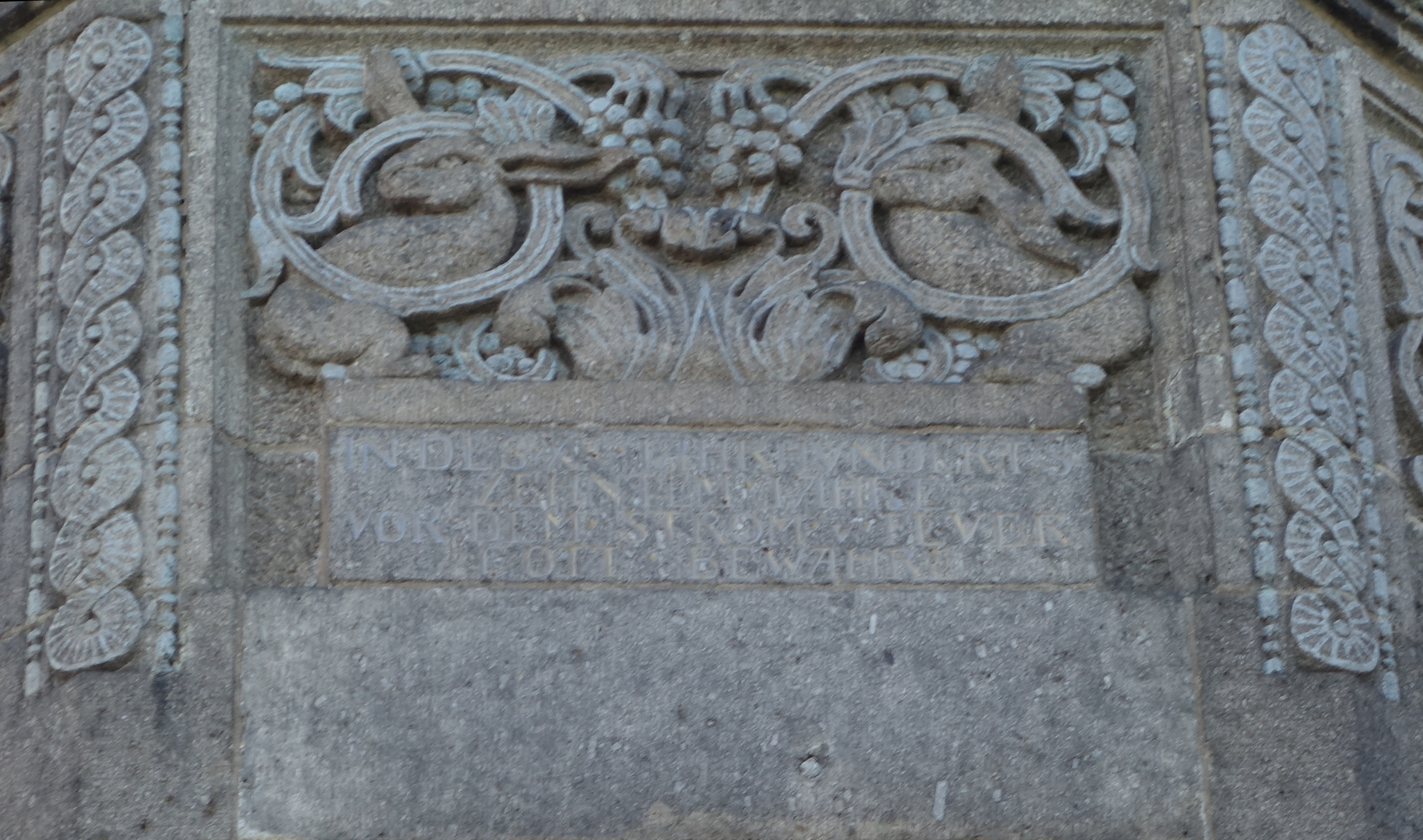 In Unkel, Rheinland-Pfalz, 30. Juni 2018. Villa Profitlich, Profitlich & Söhne, Rauchwarenveredlung